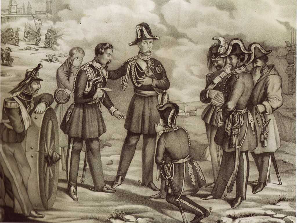 Carlo Alberto di Savoia abdica in Favore a Vittorio Emanuele II